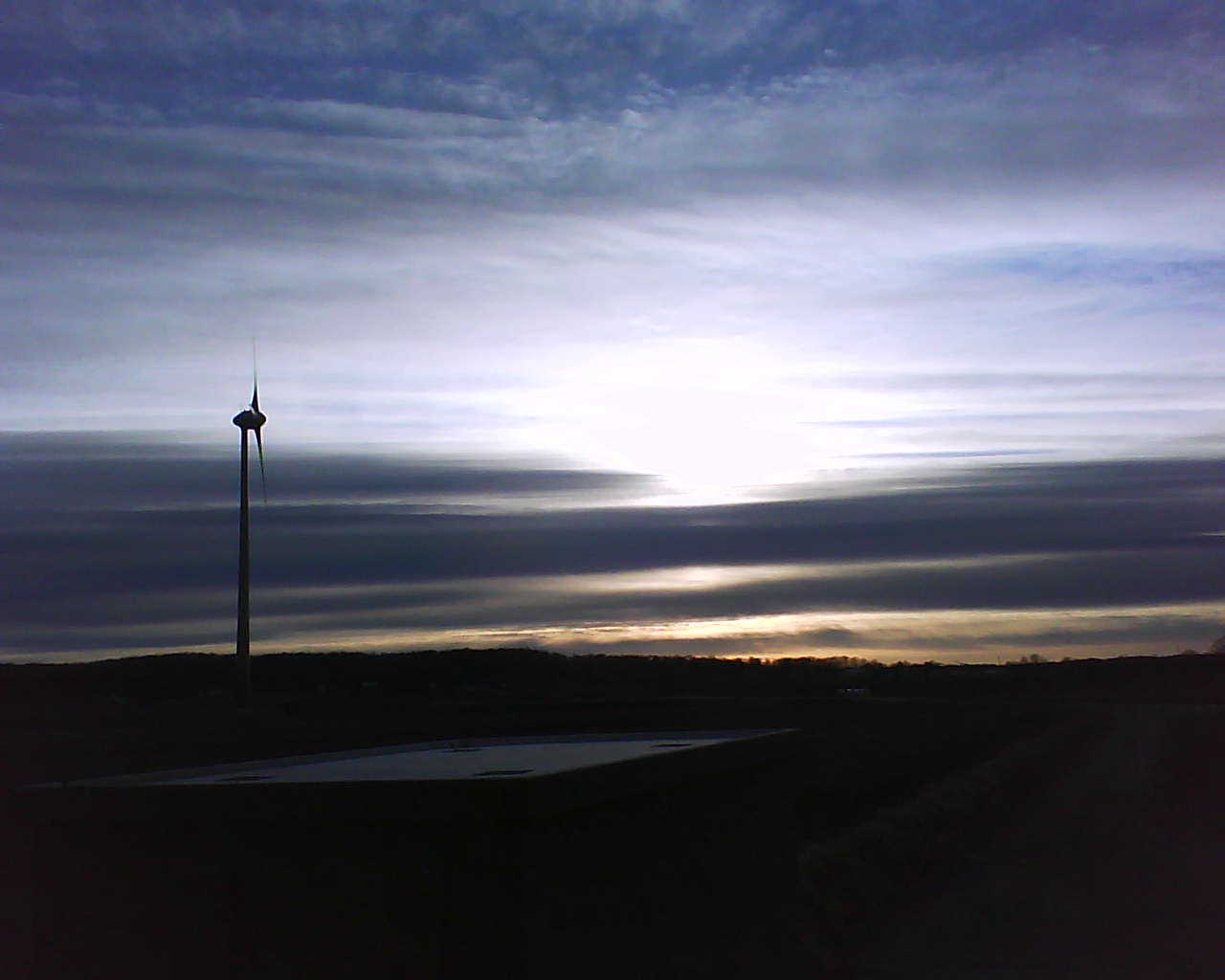 Vindkraftverk i Mörby, Blekinge (Listerlandet). Mars 2009.